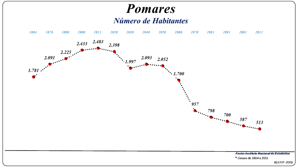 População